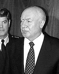 Igor Nikolayevich Rodionov (Игорь Николаевич Родионов), Russian Defence Minister